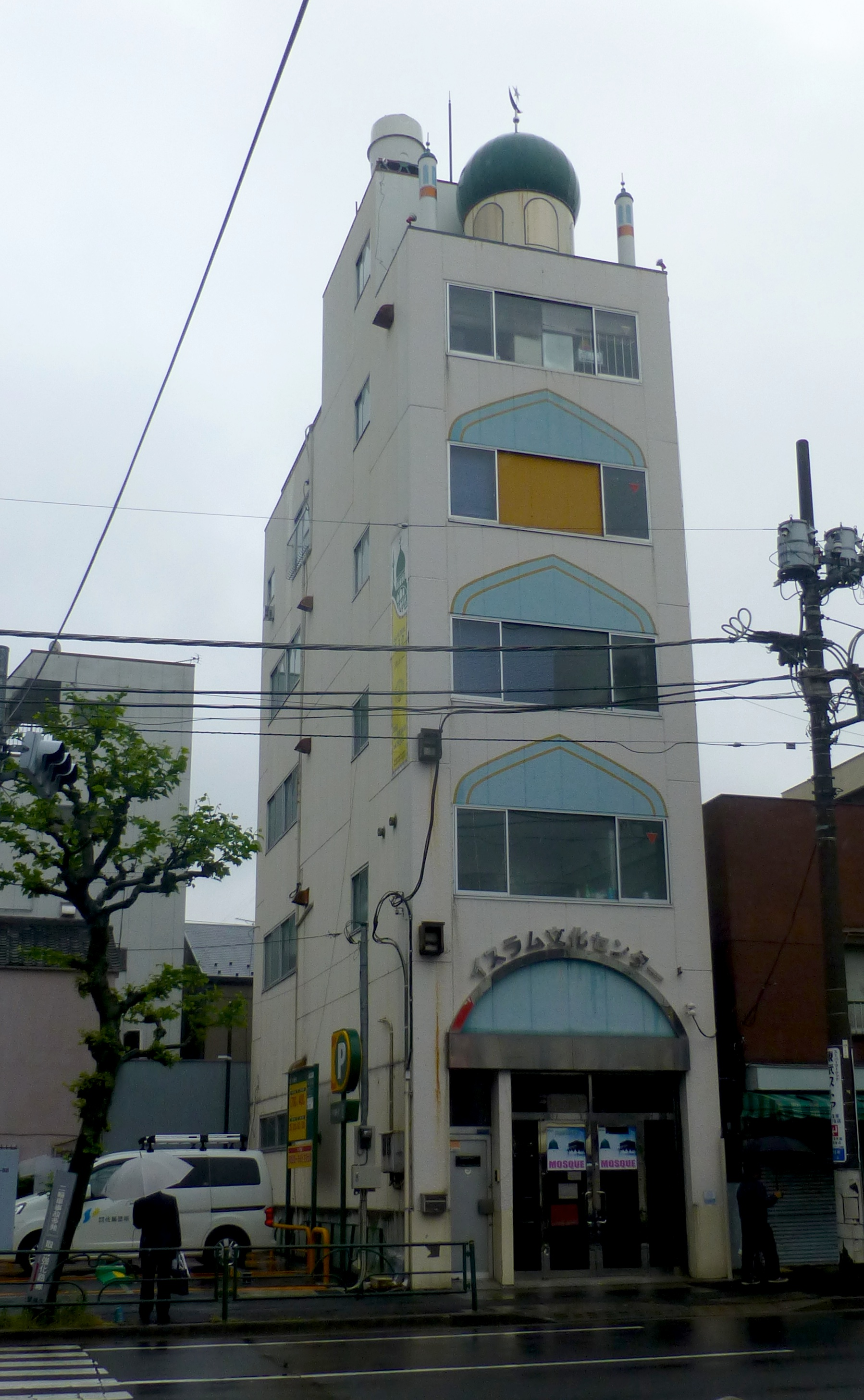 Daar Al-Arqam Mosque or commonly known as Masjid Asakusa (ダール・ル・アルカム・マスジド)